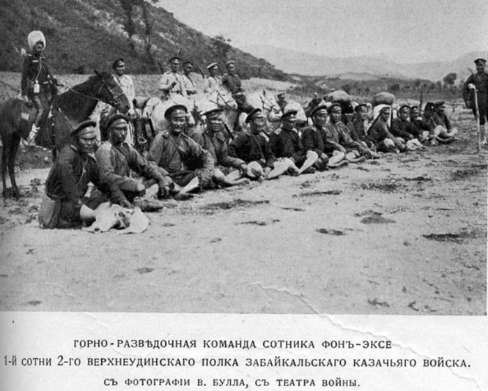 Горно-разведочная команда сотника фон-Эксе.